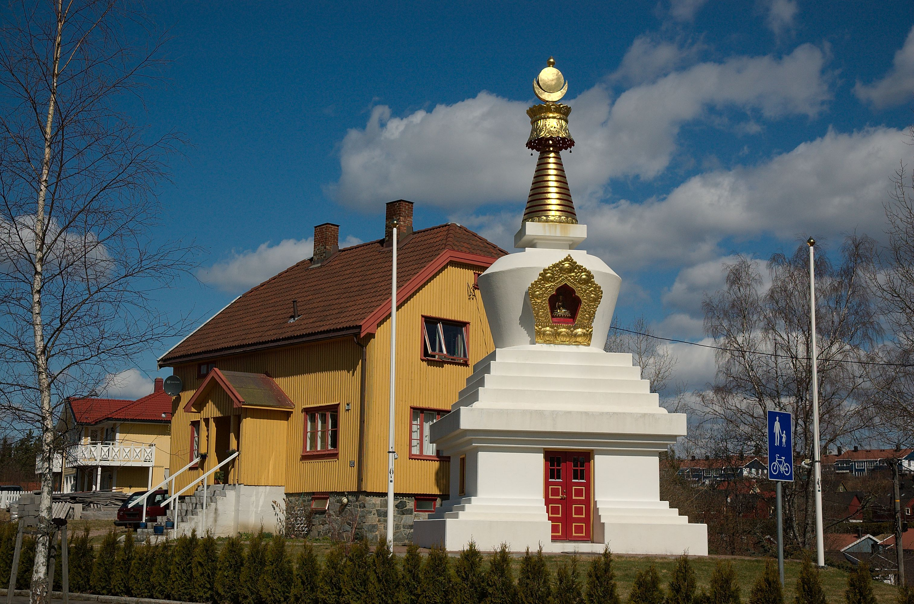 Karma Tashi Ling Buddhistsamfunn på Bjørndal i Oslo